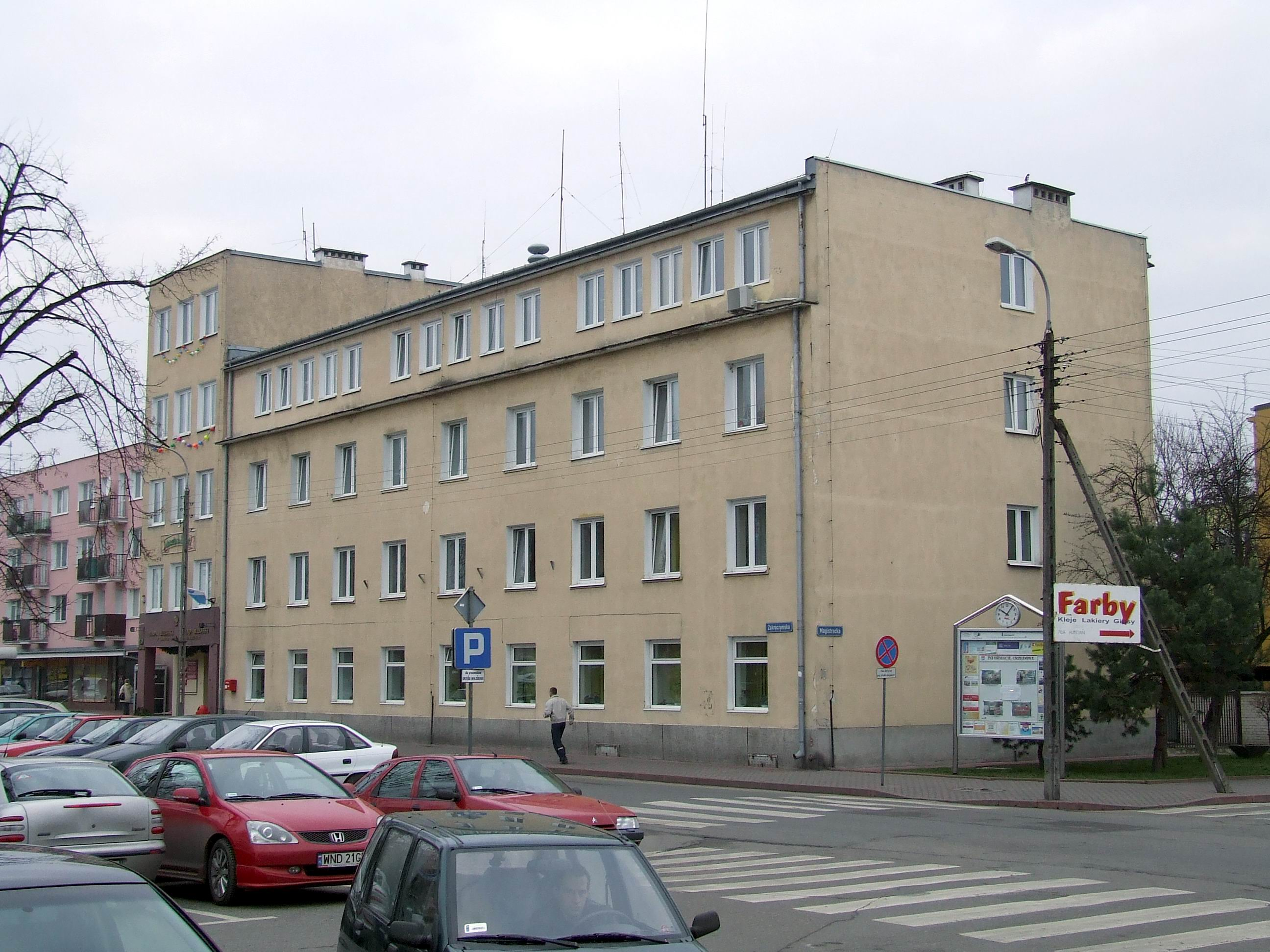 Nowy Dwór Mazowiecki, urząd miasta